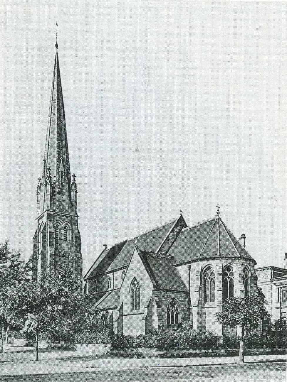 Dresden Anglikanische Kirche. All Saints Church. Aufnahme um 1875